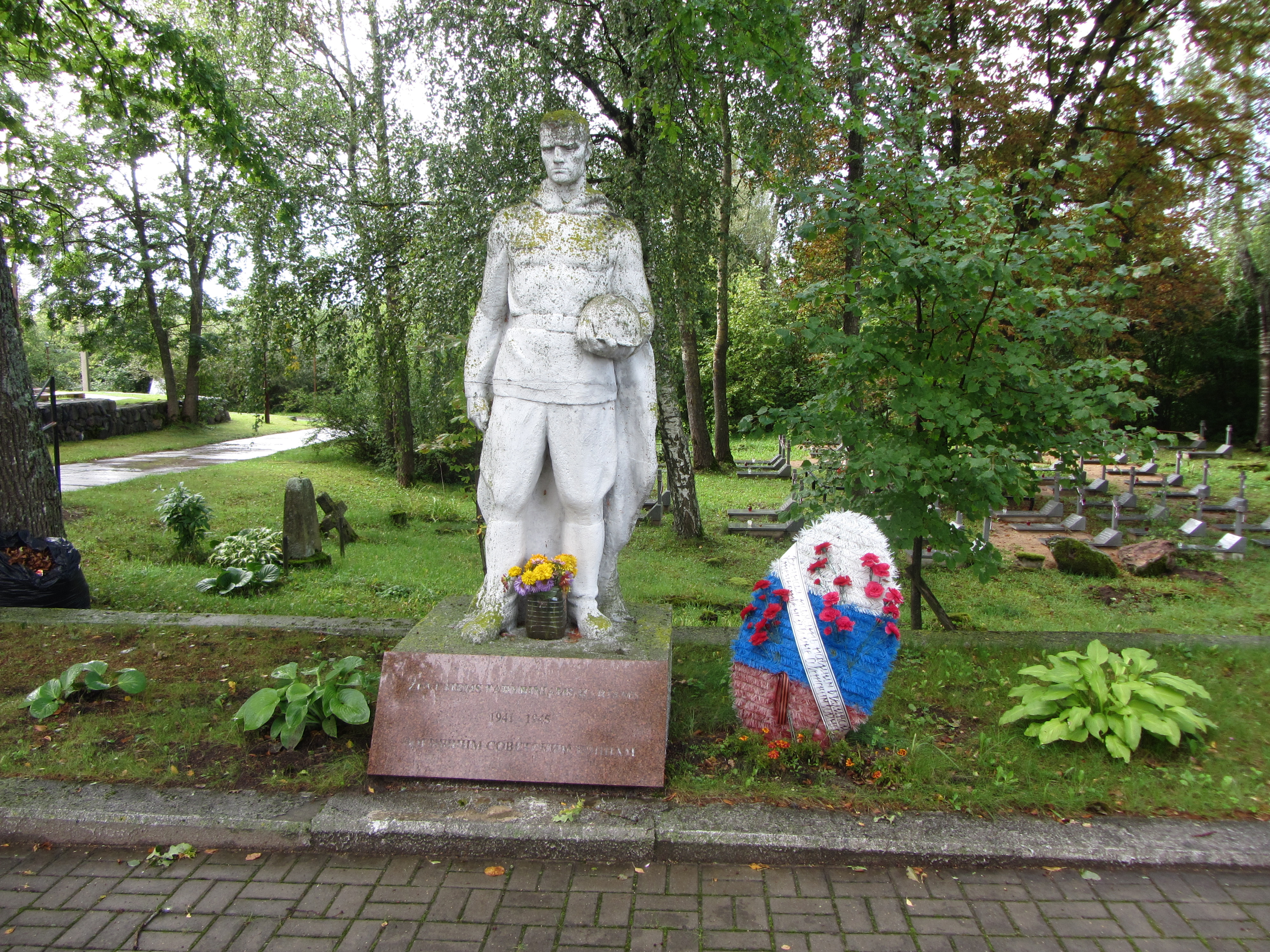 Dūkštas, Lithuania